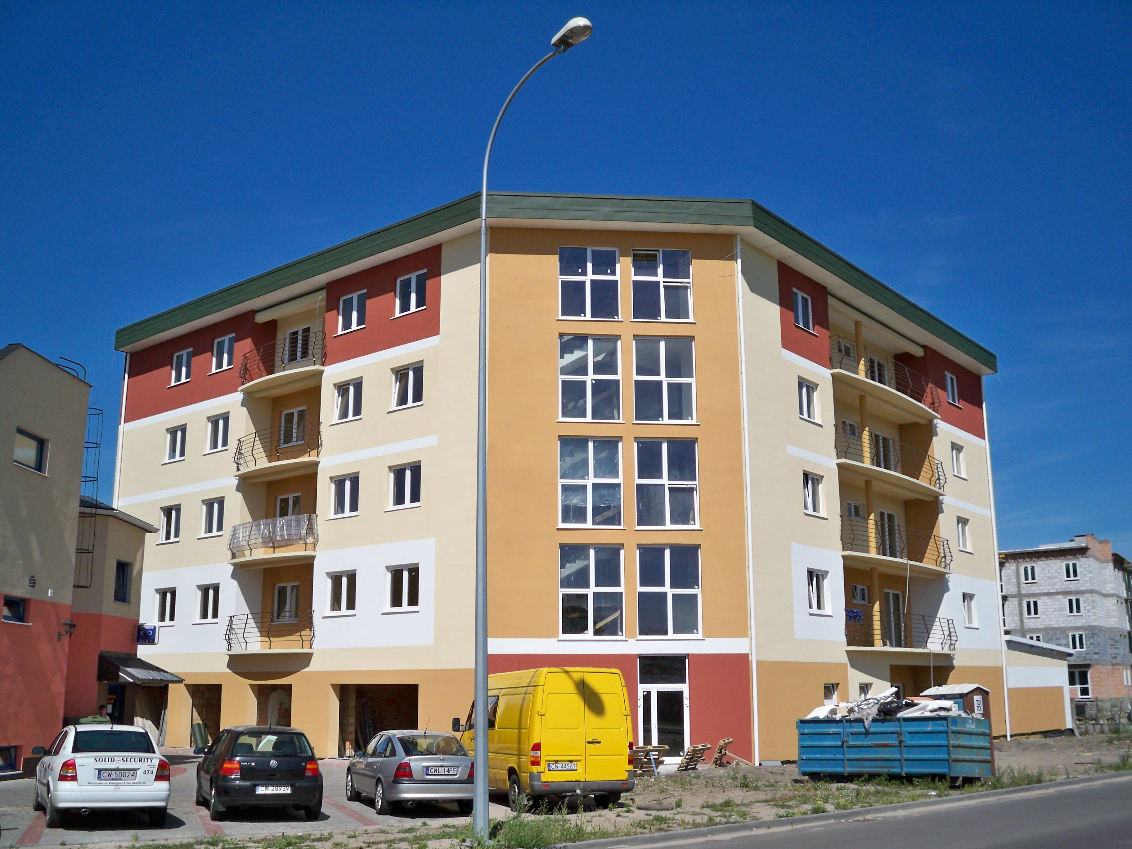 Nowy blok przy ul. Celulozowej 21 (2009 r.).